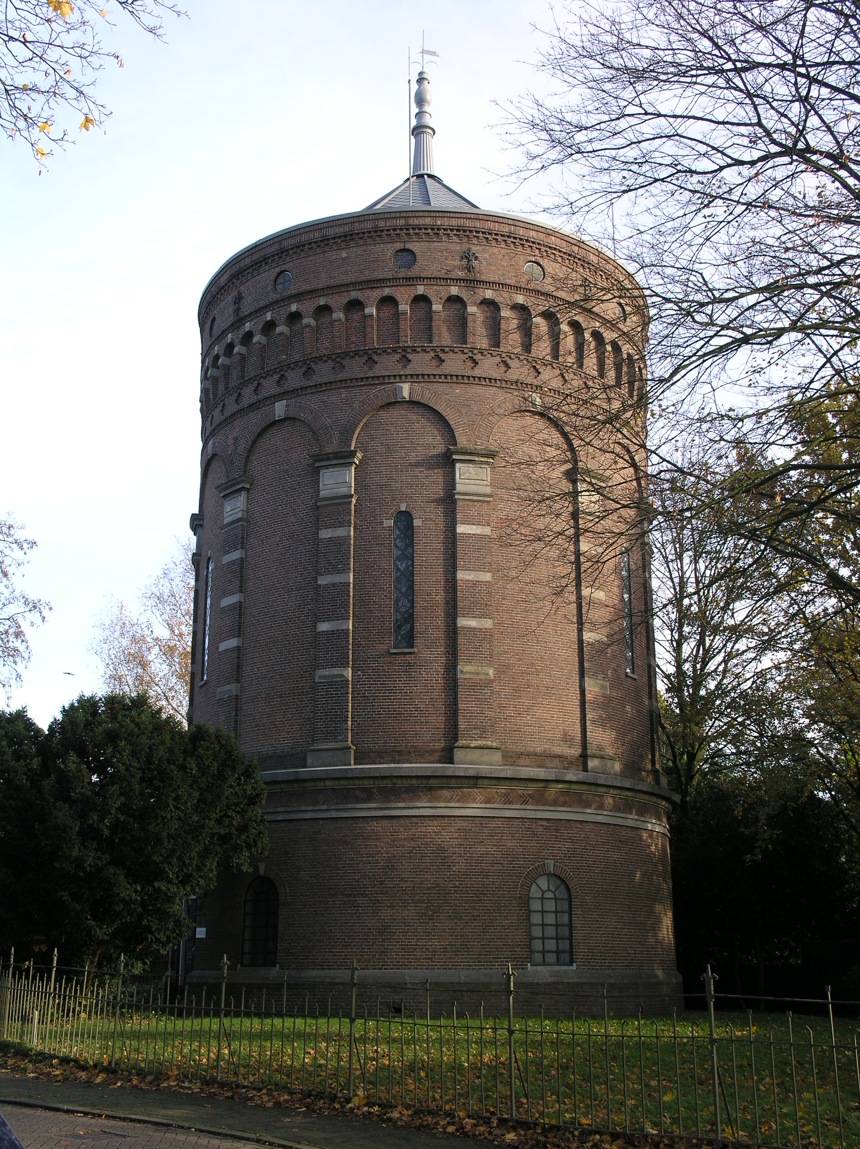 Hilversum Watertoren